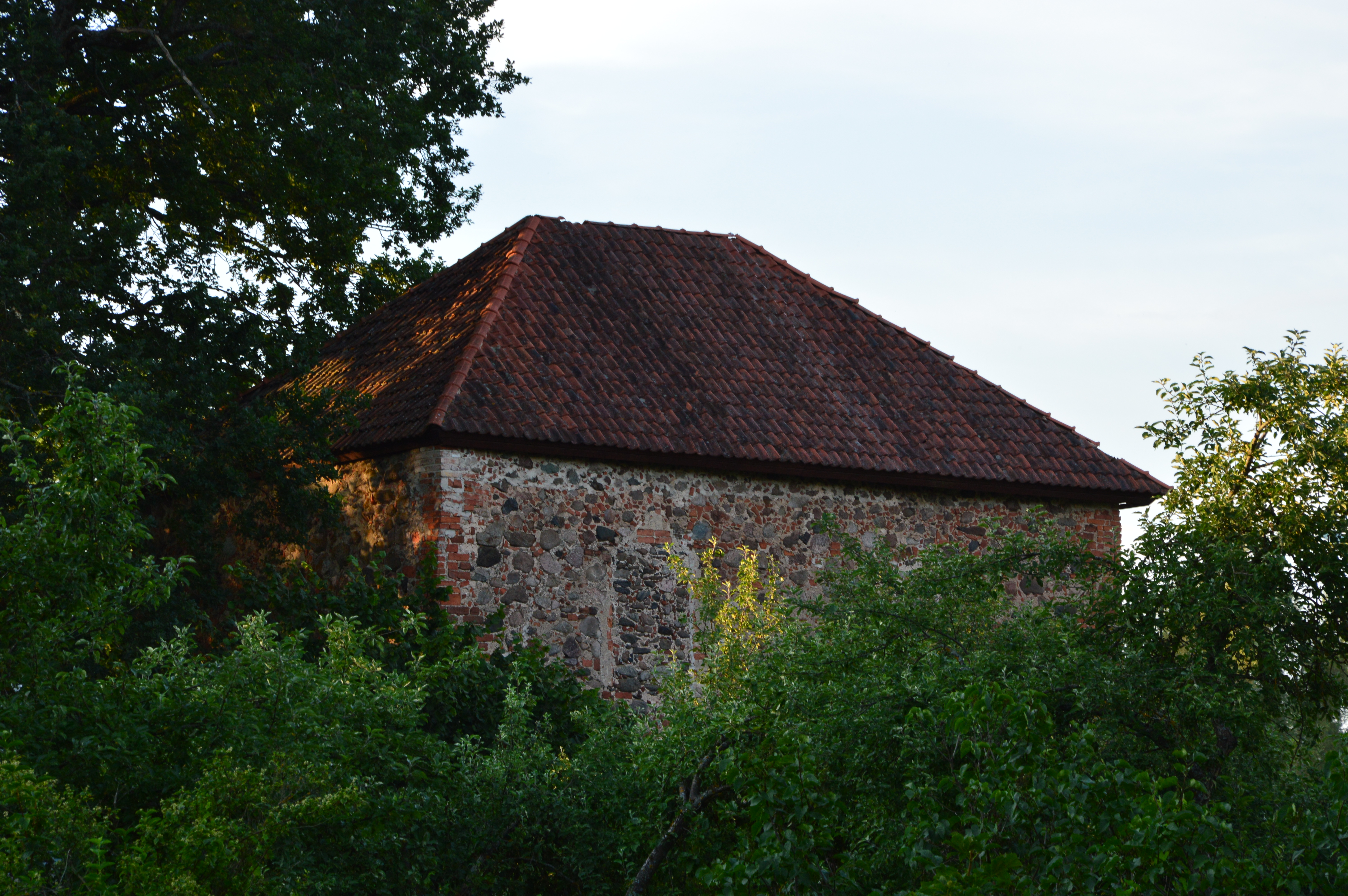 Mūrmuiža vasallilinnus